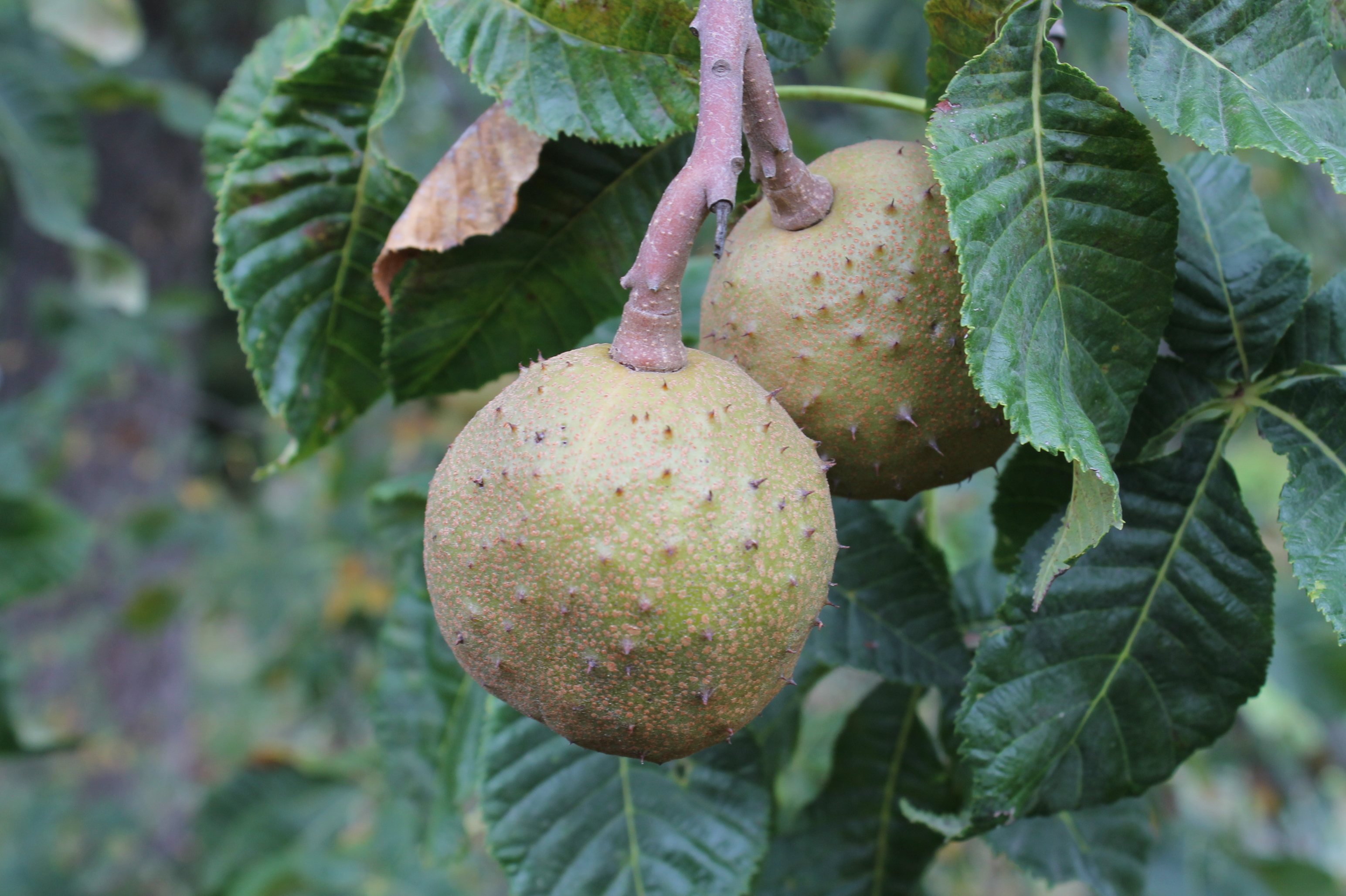 Aesculus × carnea , Plant collection of Gymnázium Brno-Řečkovice